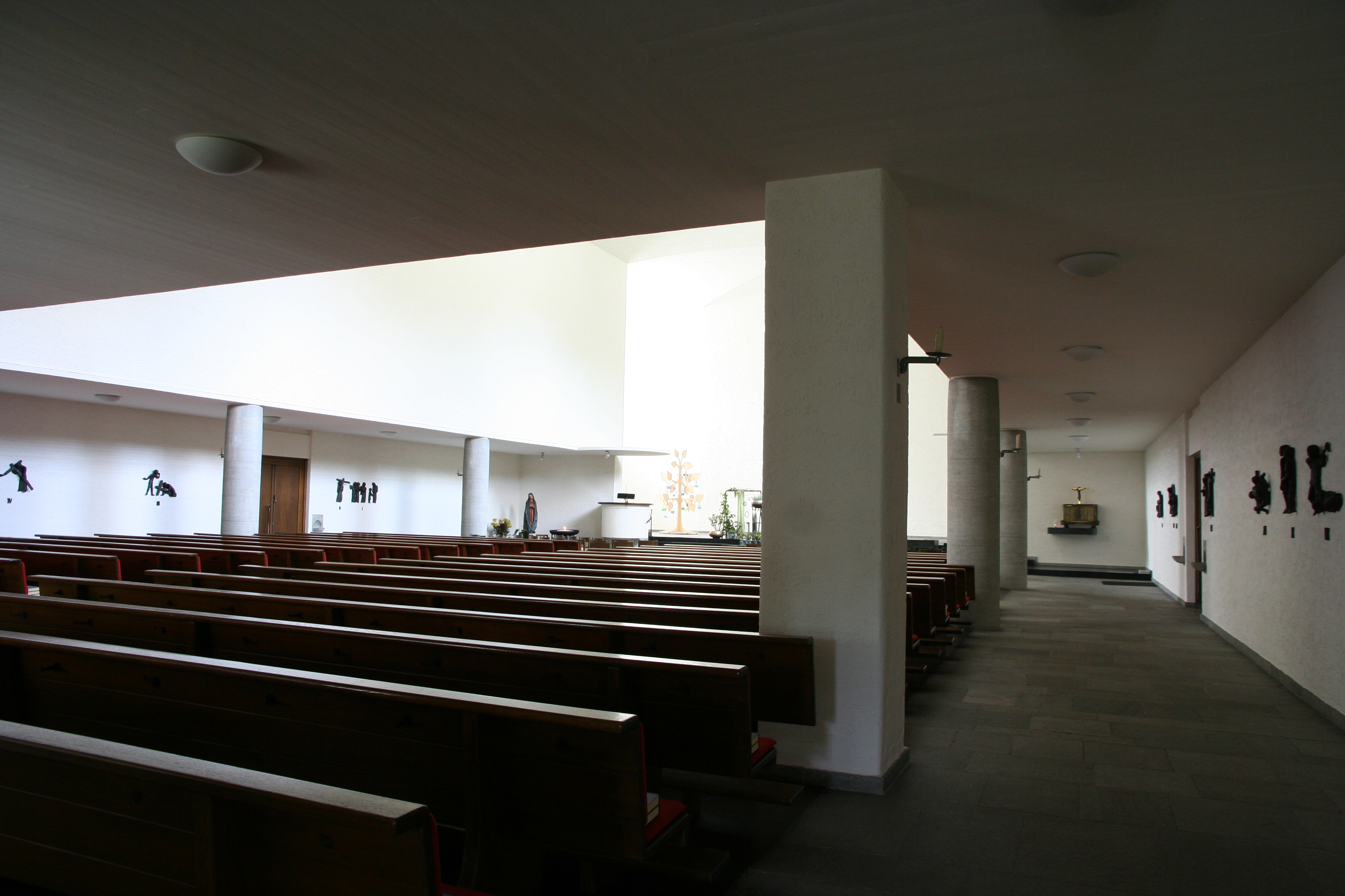 Römisch-katholische Pfarrkirche Maria Himmelfahrt Schönenwerd SO